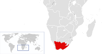 Equus quagga quagga range. Also includes national borders.